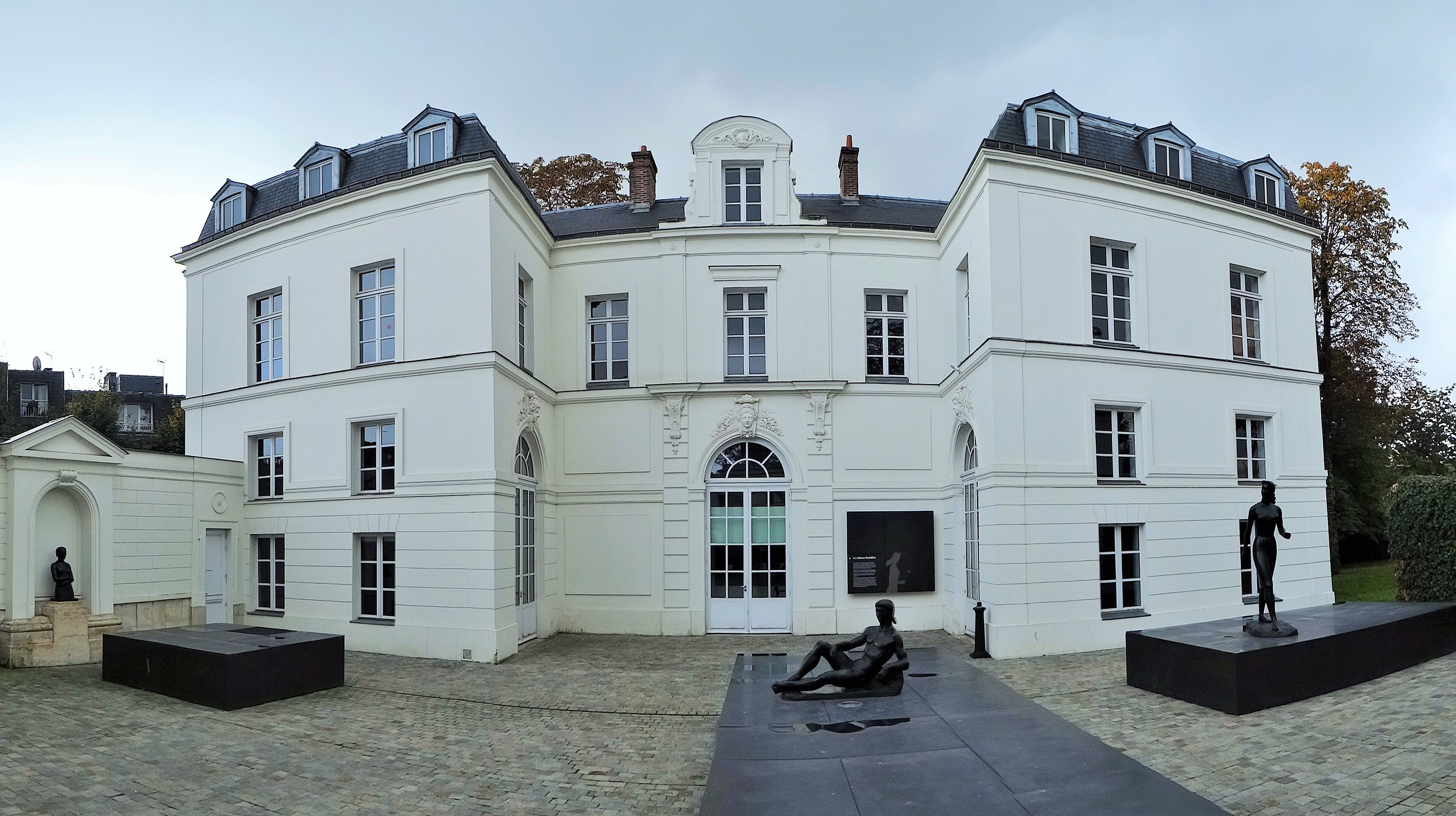 Façade du château Buchillot côté cour, musée Paul Belmondo (vue panoramique)